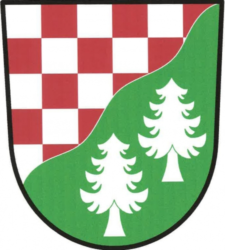 znak, Rapšach, okres Jindřichův Hradec